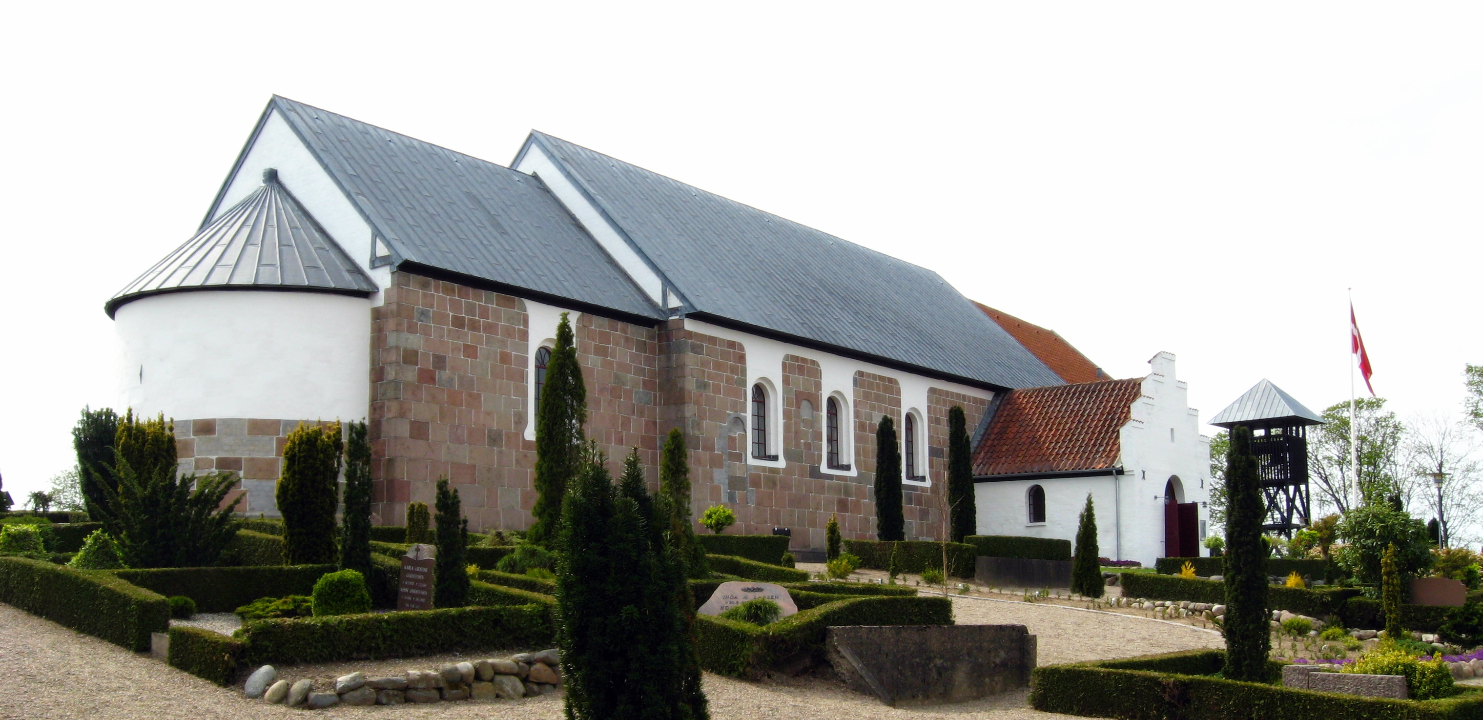 Tårs Kirke (Hjørring Kommune)